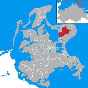 Sagard, Landkreis Rügen, Mecklenburg-Vorpommern